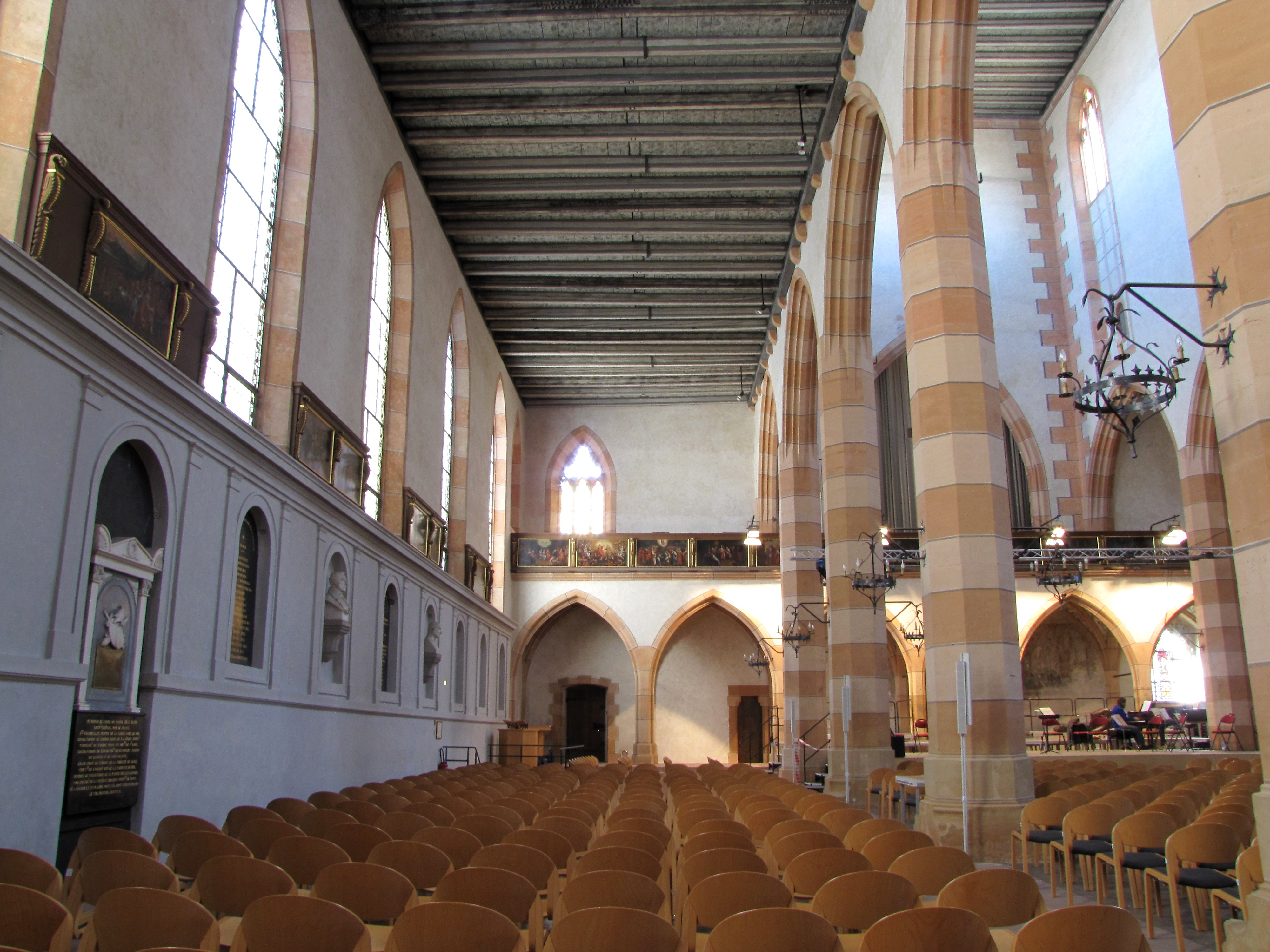 Alsace, Haut-Rhin, Église protestante Saint-Matthieu de Colmar (XIVe) (PA00085367).